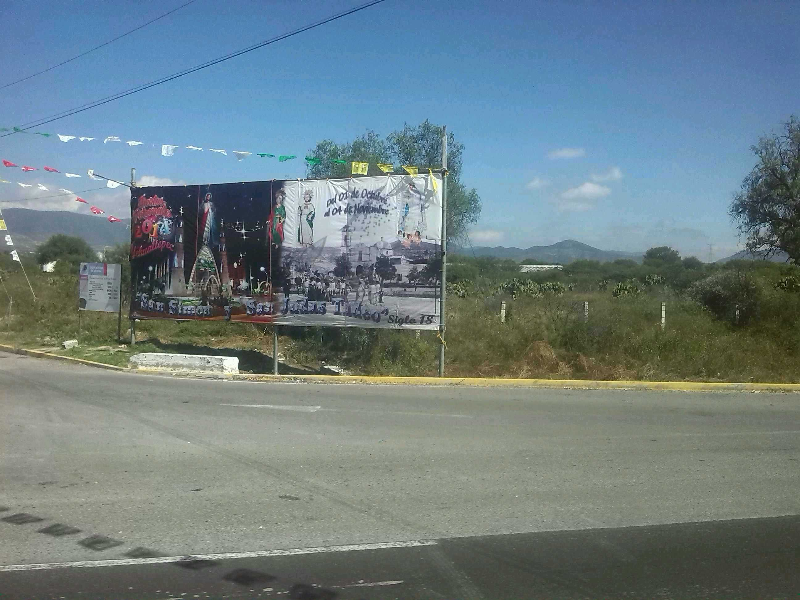 Feria de San Simón Yehualtepec, Puebla